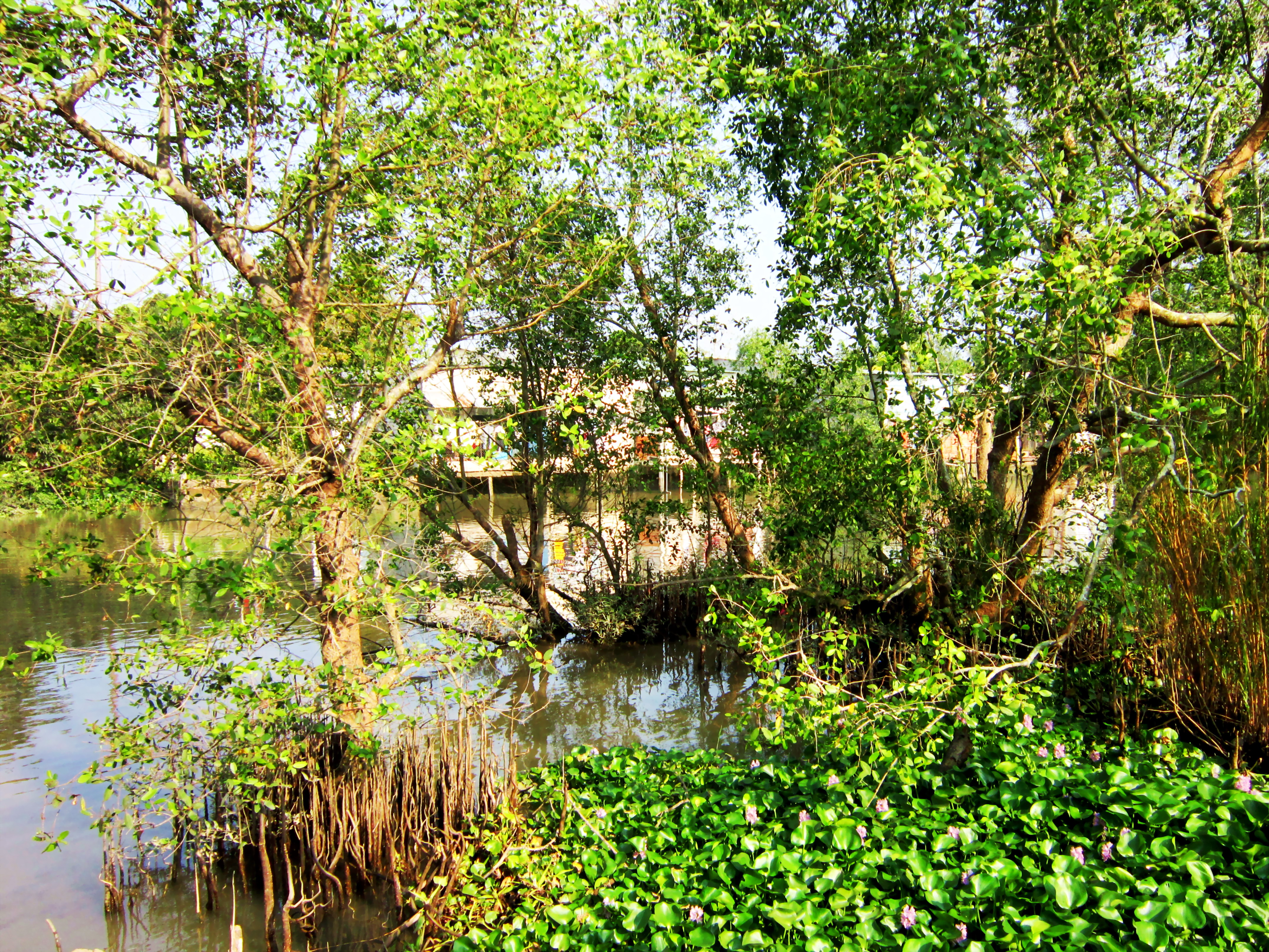 Cây bần mọc um tùm trên rạch Cái Răng, thuộc quận Cái Răng, TP Cần Thơ, Việt Nam.